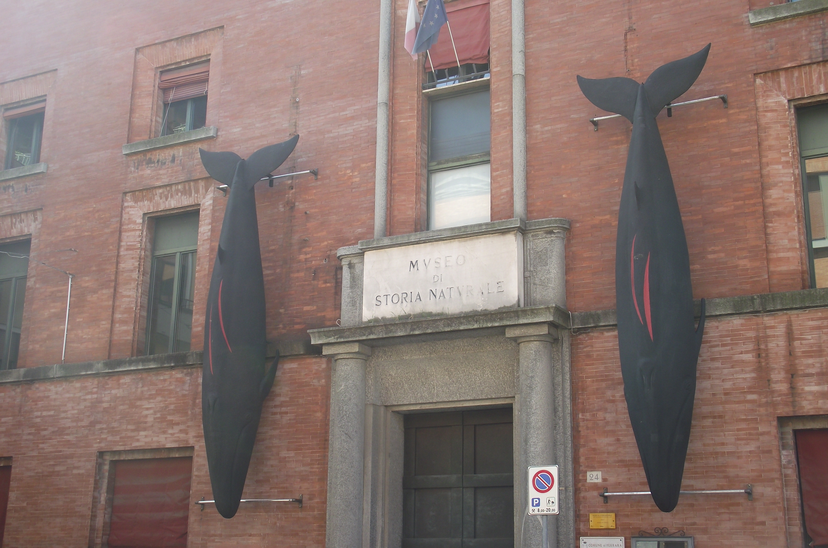 Museo di Storia Naturale This is a photo of a monument which is part of cultural heritage of Italy.